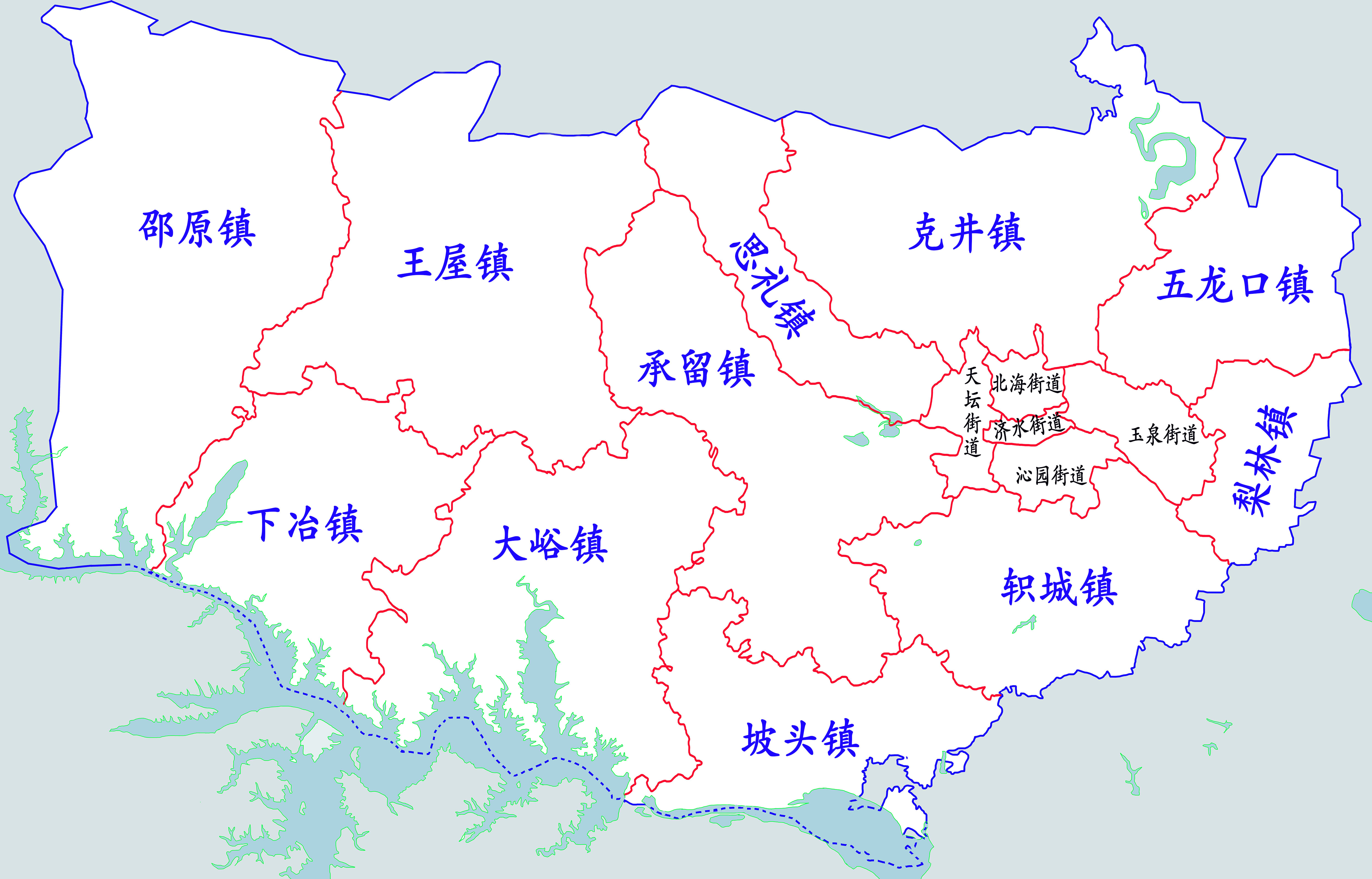 지위안지도